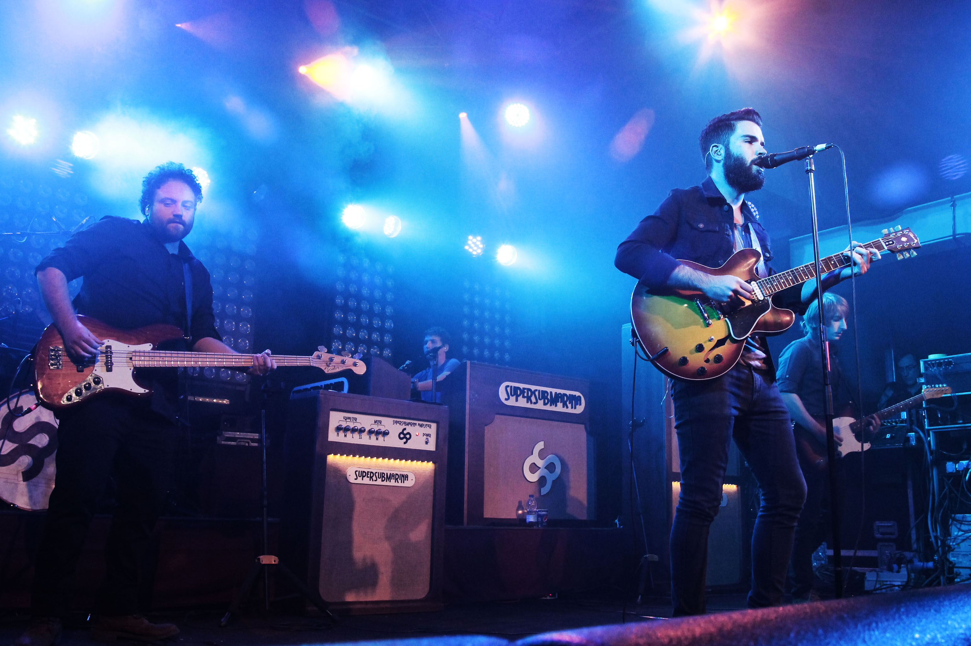 Supersubmarina en Valladolid en 2014